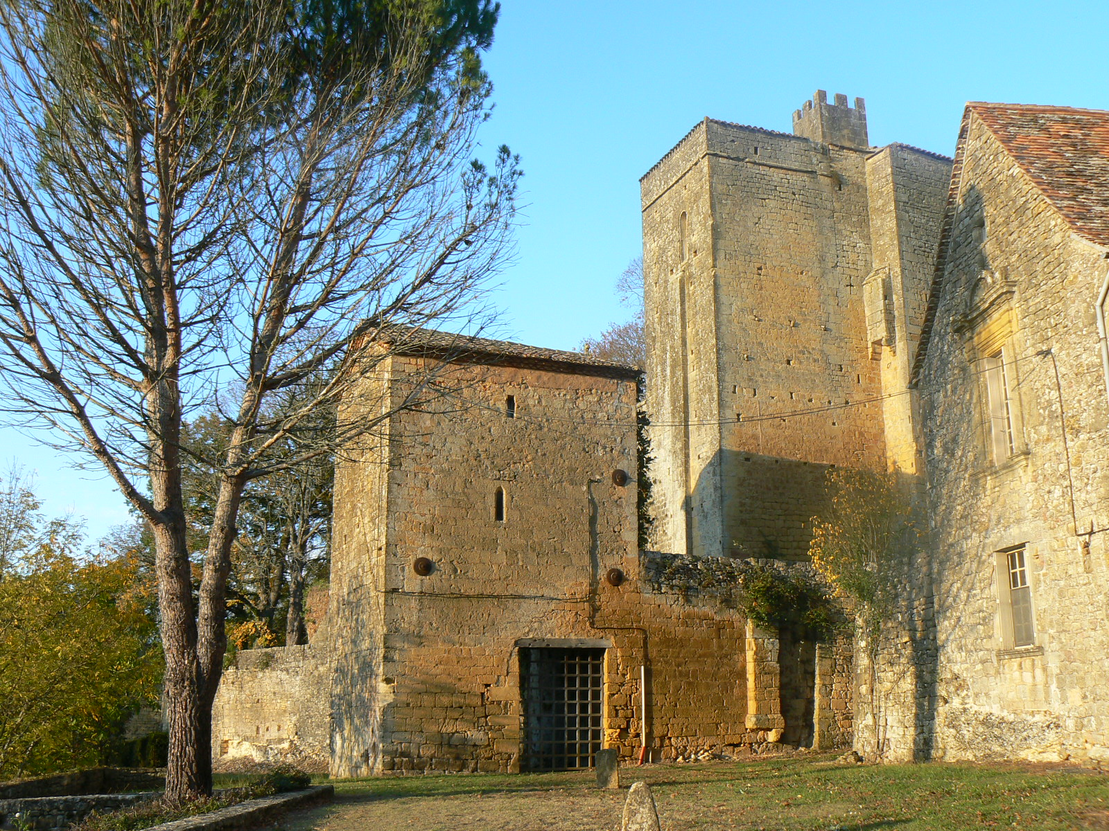 Château de Montferrand à Montferrand-du-Périgord (Dordogne, France) .